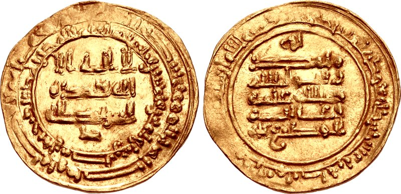 Dinar cunhado em 965/966 pelo ikchídida Abul Misque Cafur